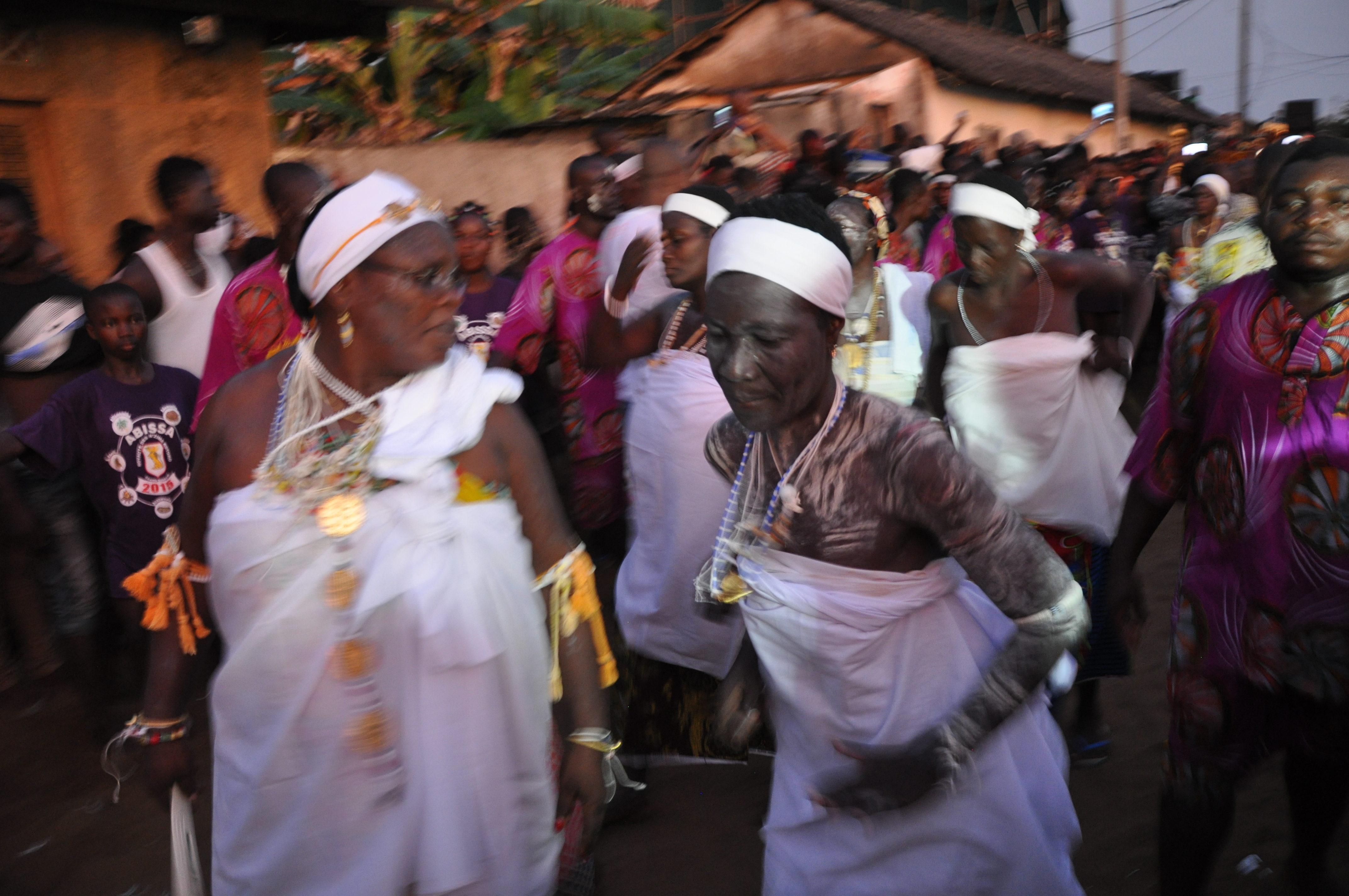 Le blanc, une des couleurs préférées des prêtresses traditionnelles. This is an image of Cultural Fashion or Adornment from Ivory Coast